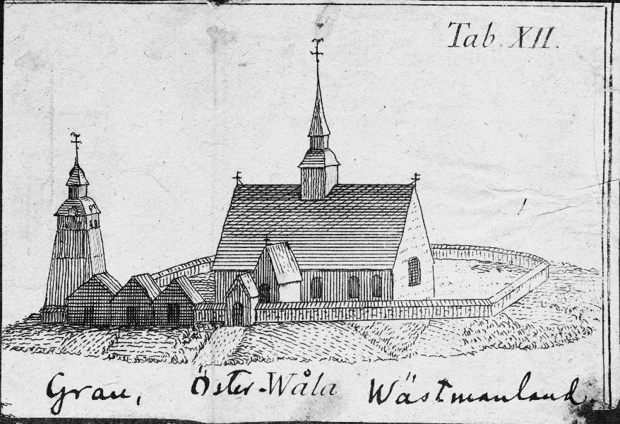 Kyrkan mot söder, som den såg ut 1748. Efter Olof Graus Beskrifning öfver Wästmanland. Avfotograferat.